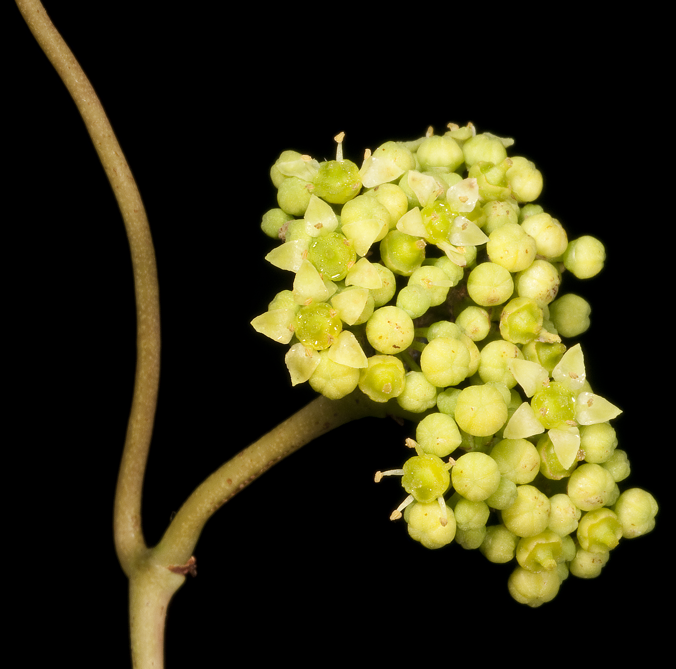 KRT4477 Western Australian Herbarium